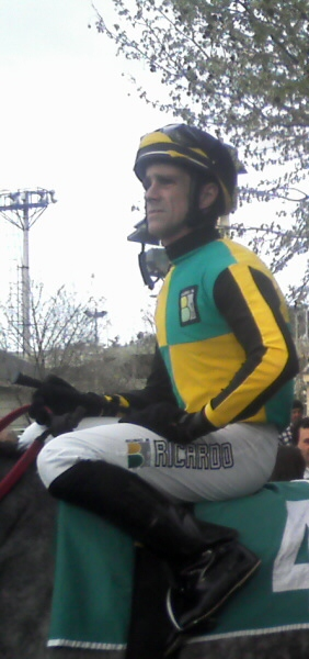 Jorge Ricardo en la previa de la 7ma carrera del 24 de septiembre de 2012 disputada en el Hipódromo Argentino de Palermo.